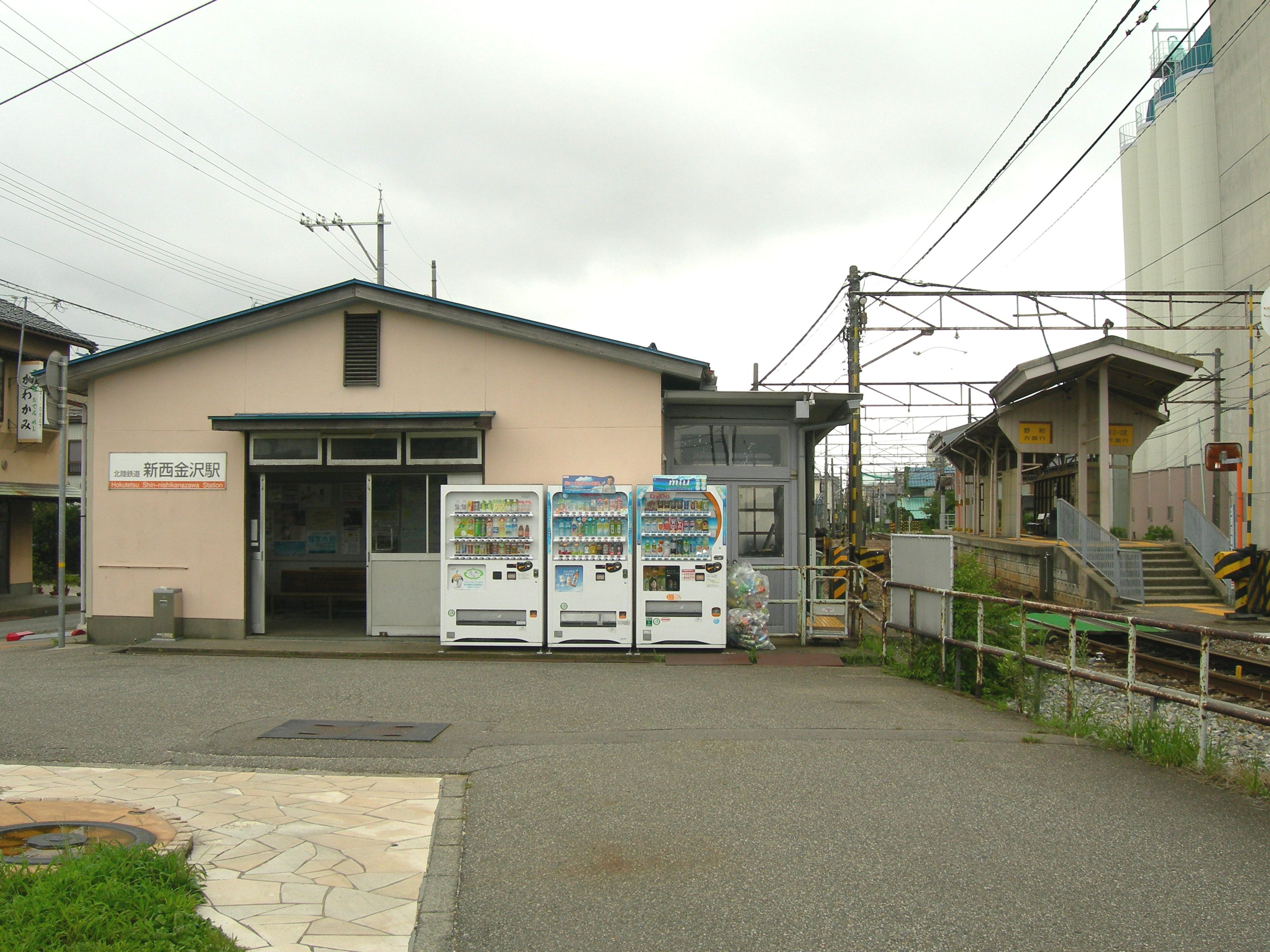 新西金沢駅